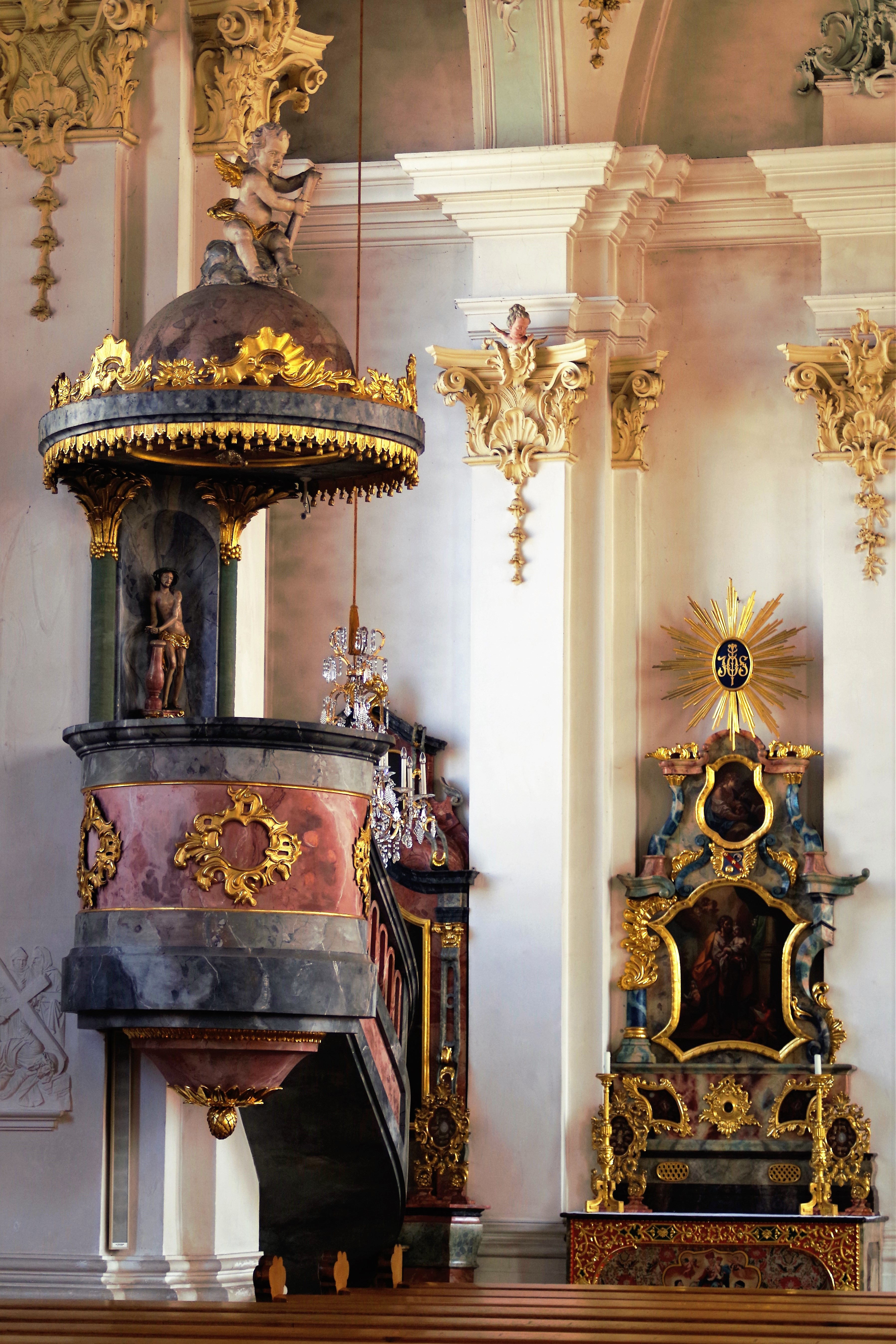 Kanzel in der Kirche Maria Himmelfahrt WT-Tiengen